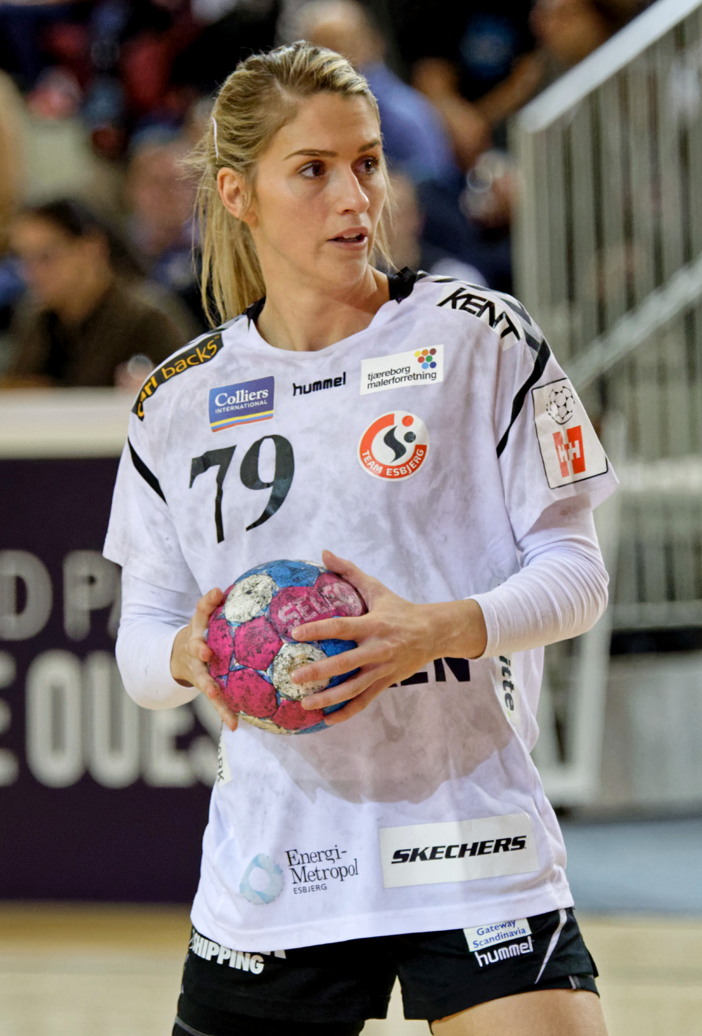 Lors de la rencontre du 3e tour de la Coupe EHF entre Paris 92 et les danoises de Team Esbjerg. A Issy les moulineaux, le 18 novembre 2018.